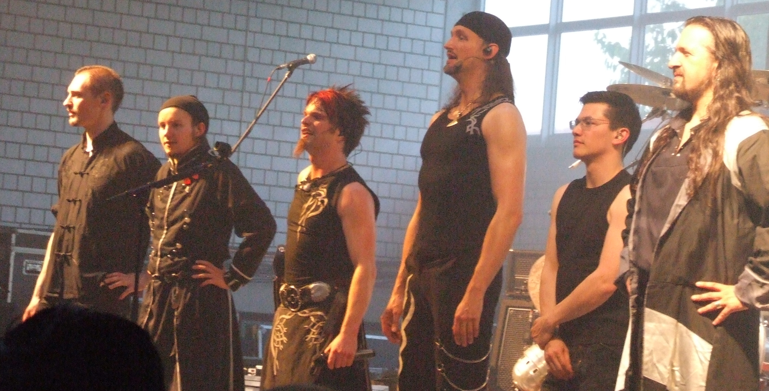 Saltatio Mortis, deutsche Mittelalter- und Rockgruppe, am Ende des Konzerts am 13. Juli 2009 in der Sommerfesthalle, Otterstadt, Deutschland, vor den Zugaben